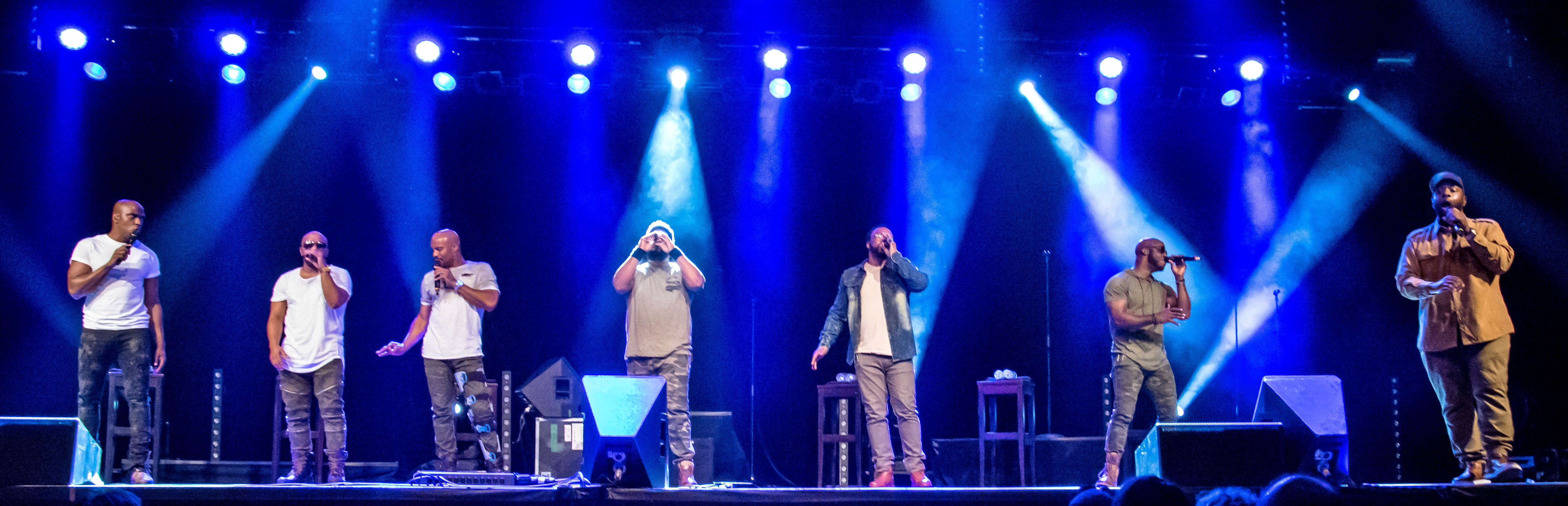 Bilder vom Zelt Musik Festival 2018 in Freiburg im Breisgau Auftritt Naturally 7 am 24. Juli 2018 im Zirkuszelt "A capella Nacht"